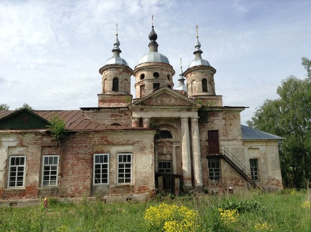 Церковь Никольская: Емельяново, Старицкий район, Тверская область